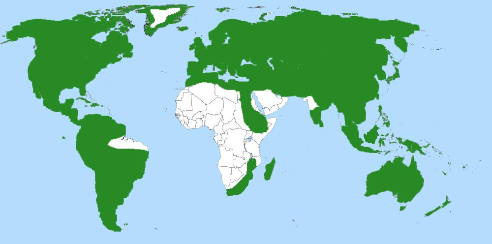 карта ареала рапространения рода Осока